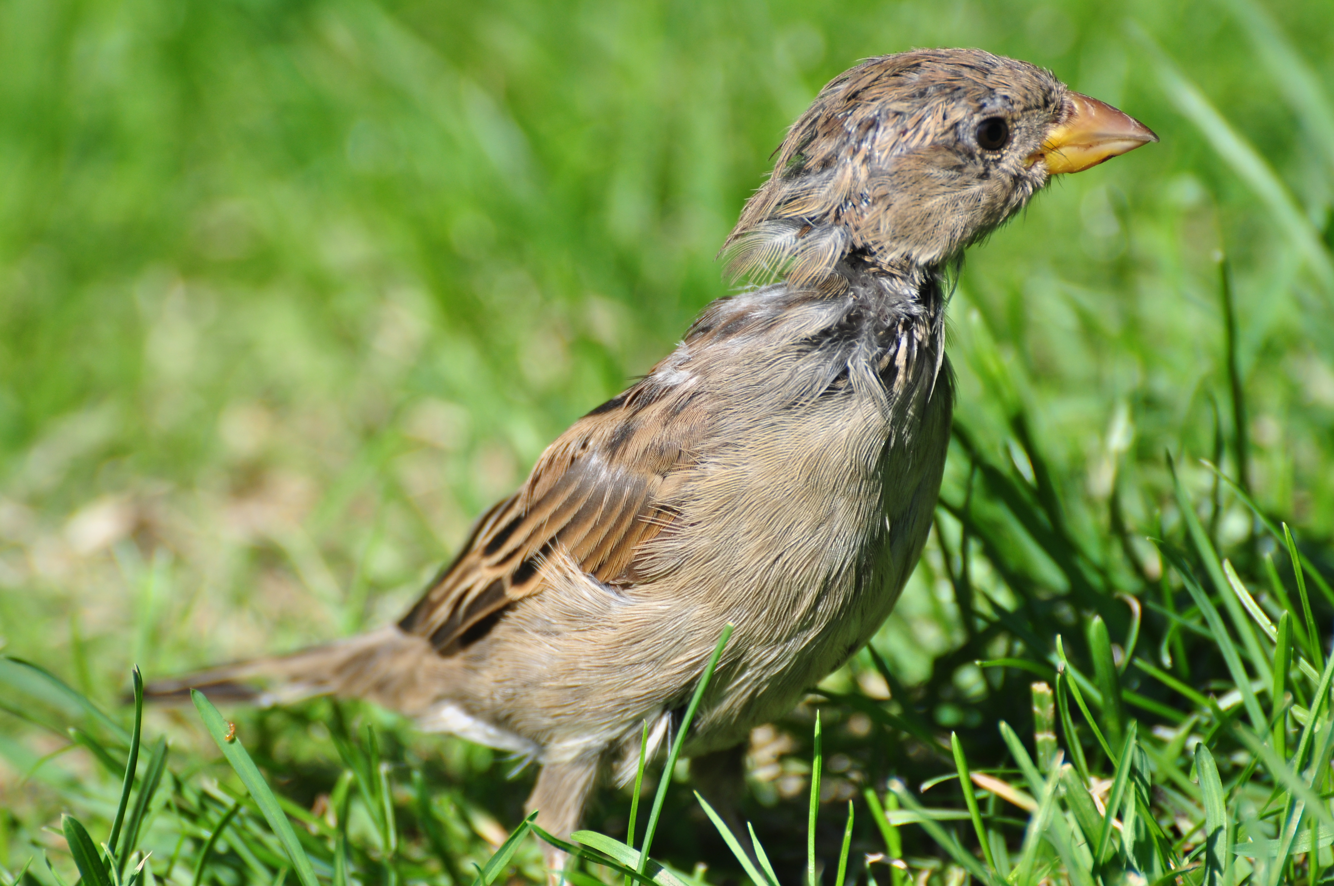 Passer domesticus, Arboretum in Zürich (Switzerland)